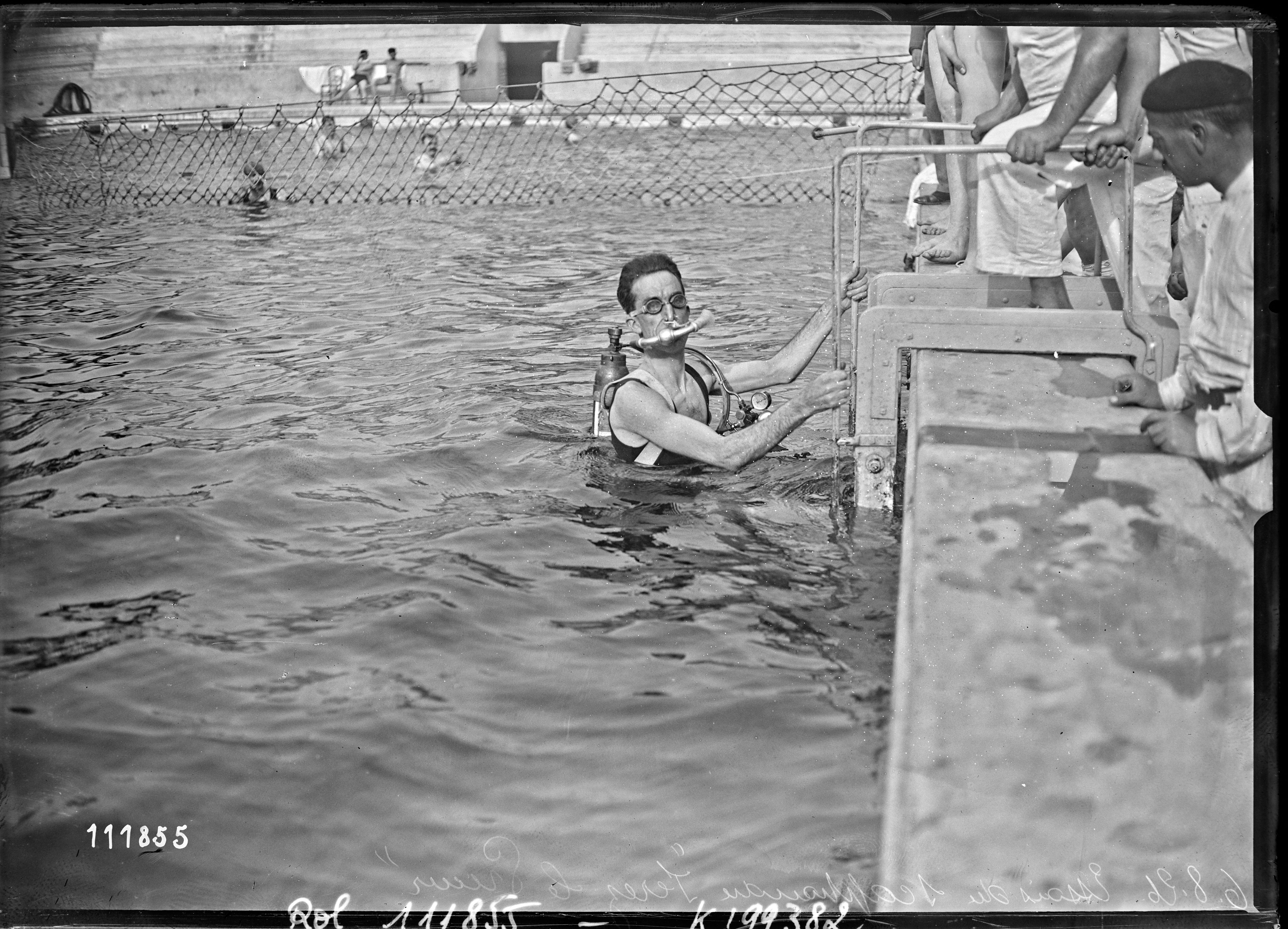 6-8-26 (piscine des Tourelles ) Le commandant Prieur avec son scaphandre